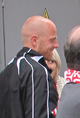 Hans-Rudi Brugger, Kapitän und Rekordspieler des FC Südtirol in der Saison 2009-2010